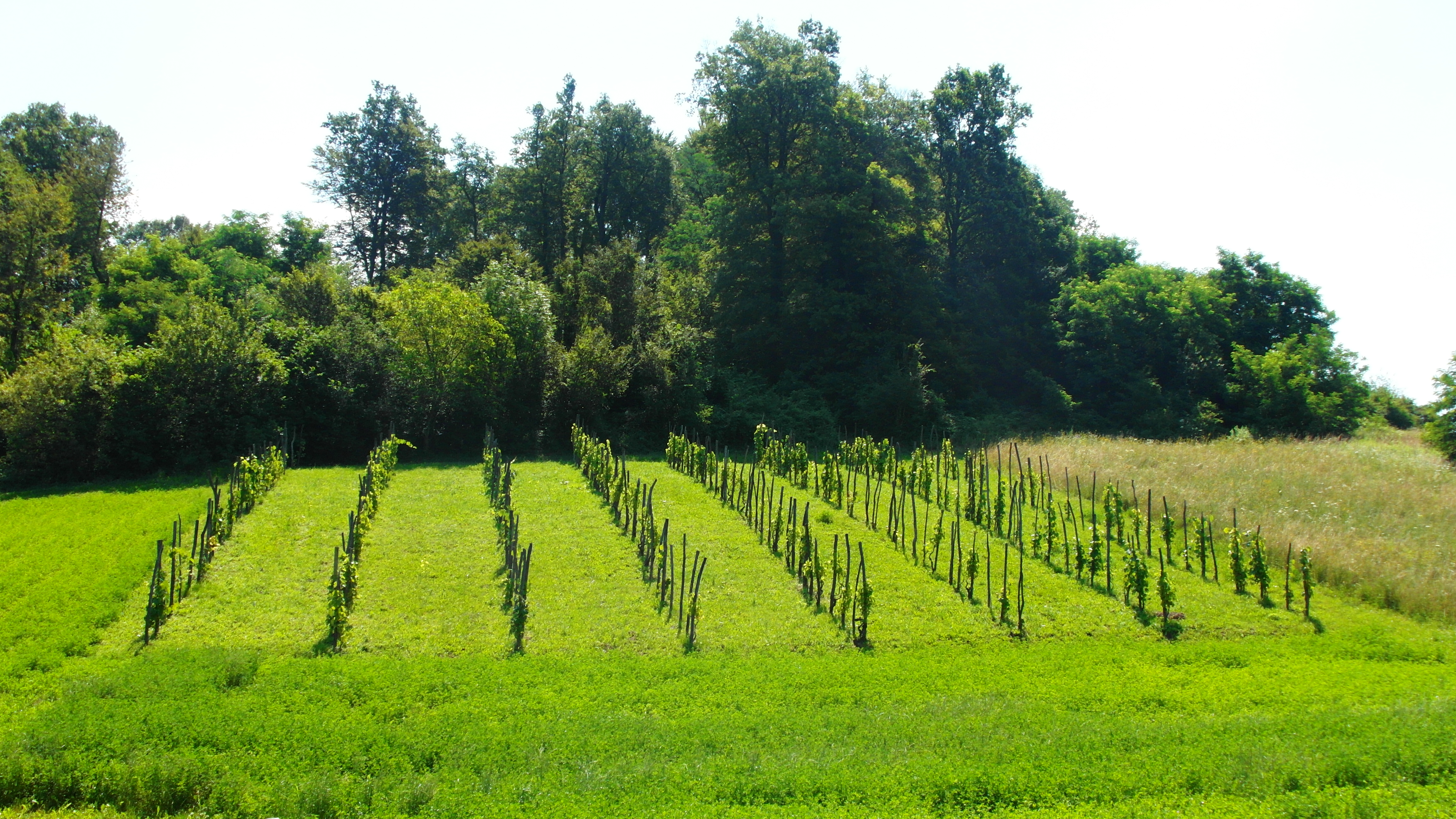 MLADÝ VINOHRAD - YOUNGH VINEYARD